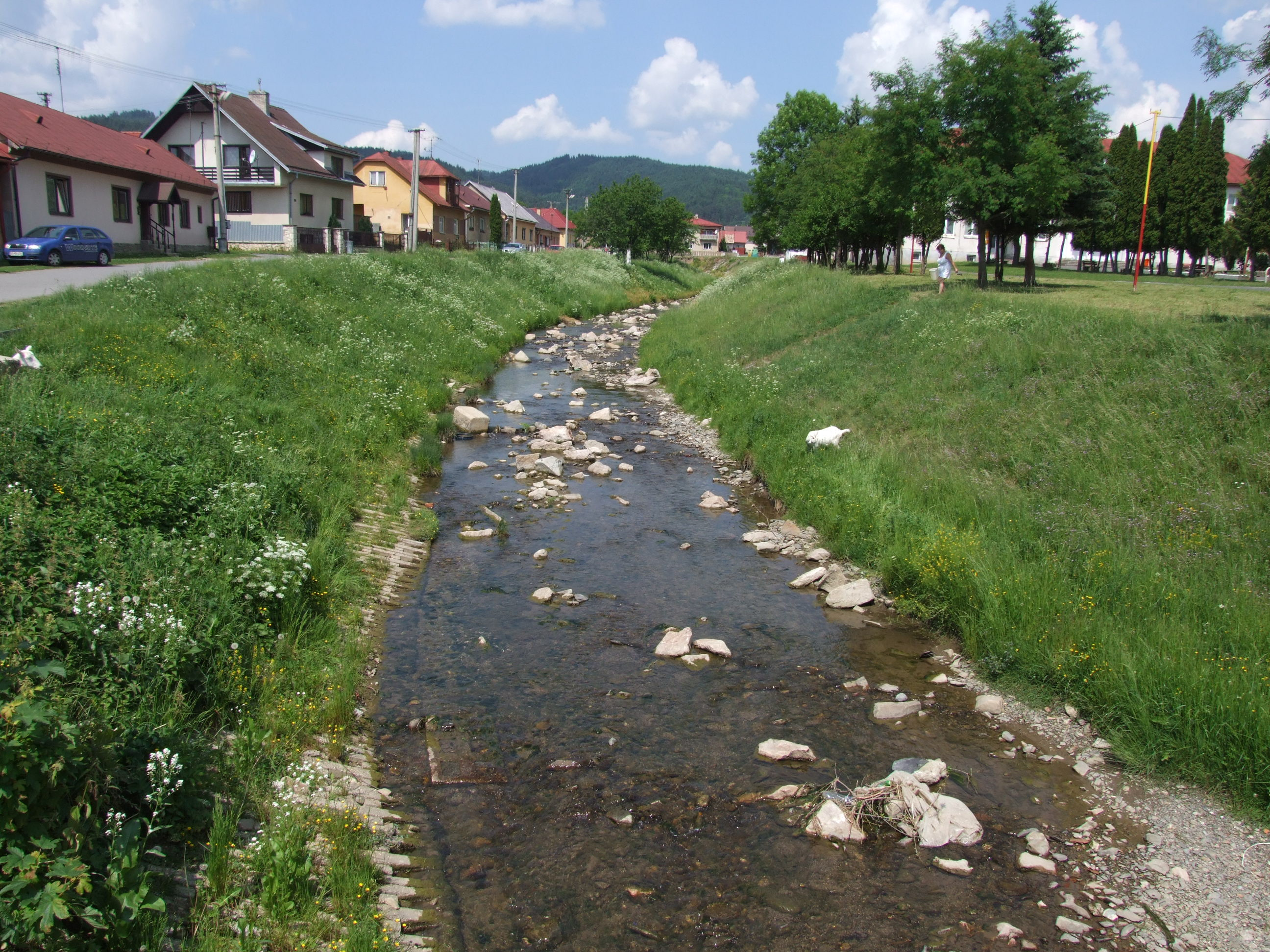 Kamienka (okres Stará Ľubovňa). Kamionka (powiat Stara Lubowla)